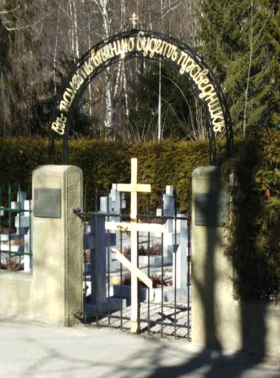 Kosakenfriedhof